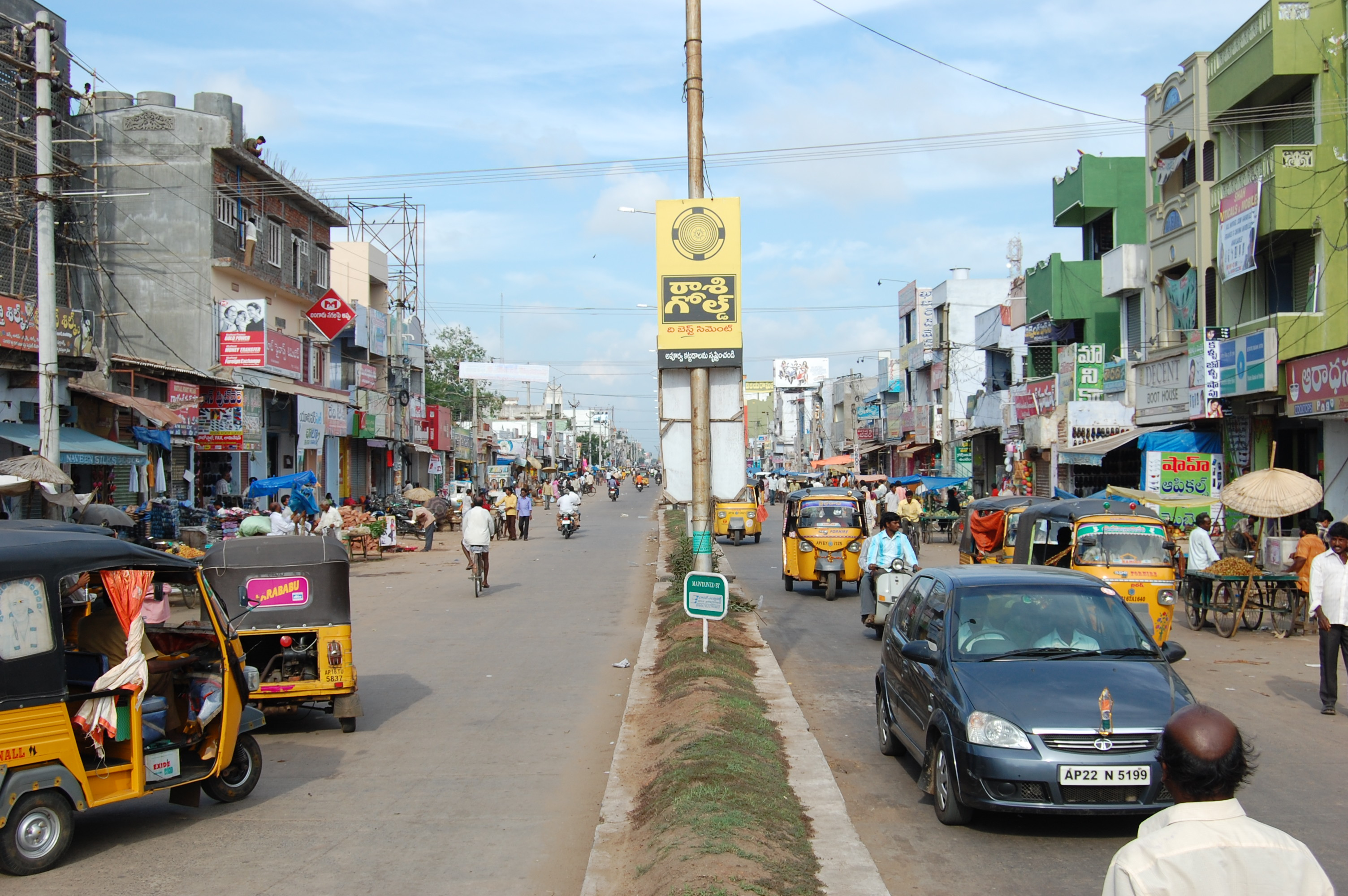 Koneru Center at Machilipatnam, India